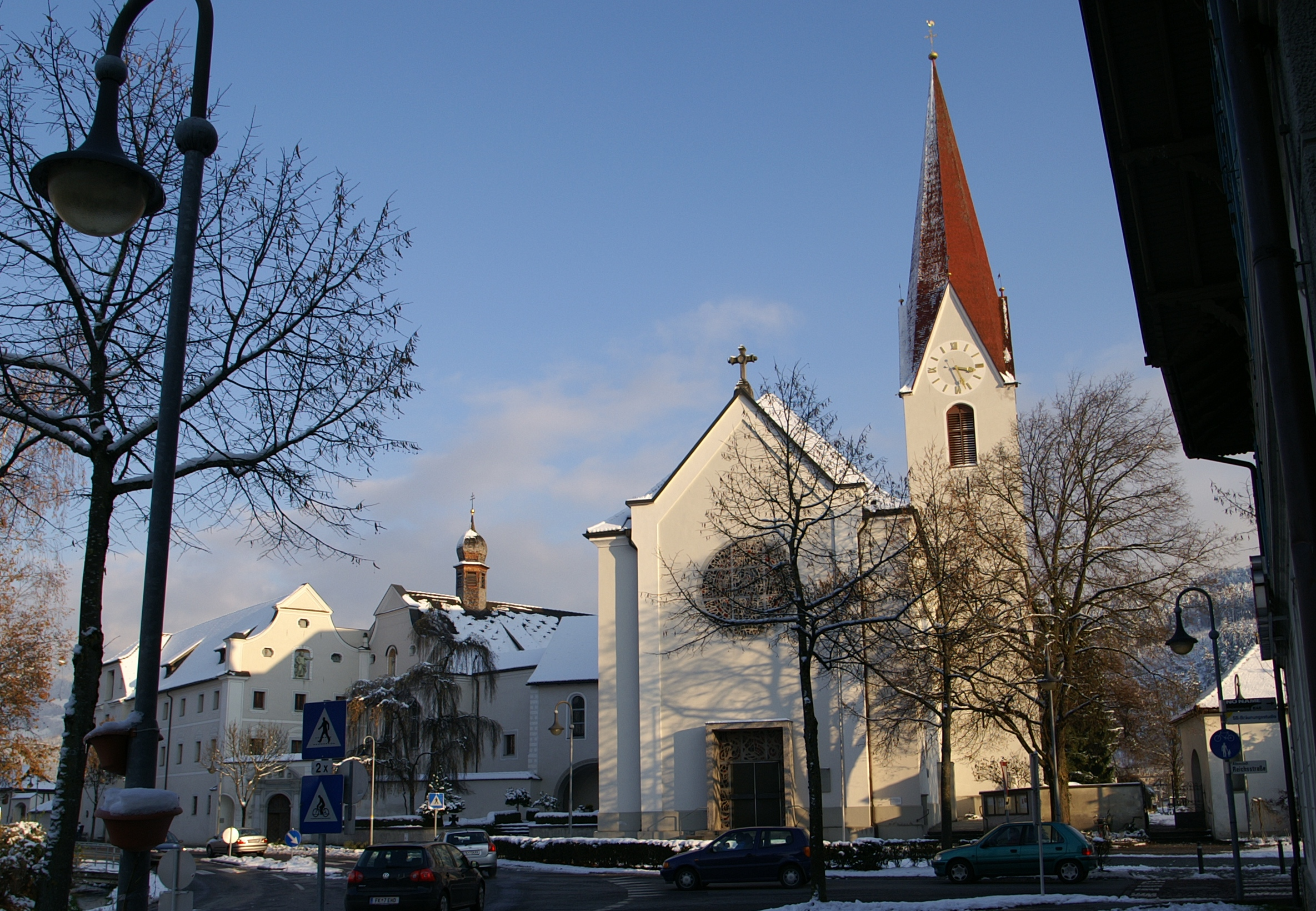 Links das Dominikanerinnenkloster, Mitte die Dominikanerinnenkirche "Maria Verkündigung", Rechts die Pfarrkirche Hll. Pankratius und Zeno im Ortsteil Altenstadt in Feldkirch, Vorarlberg.